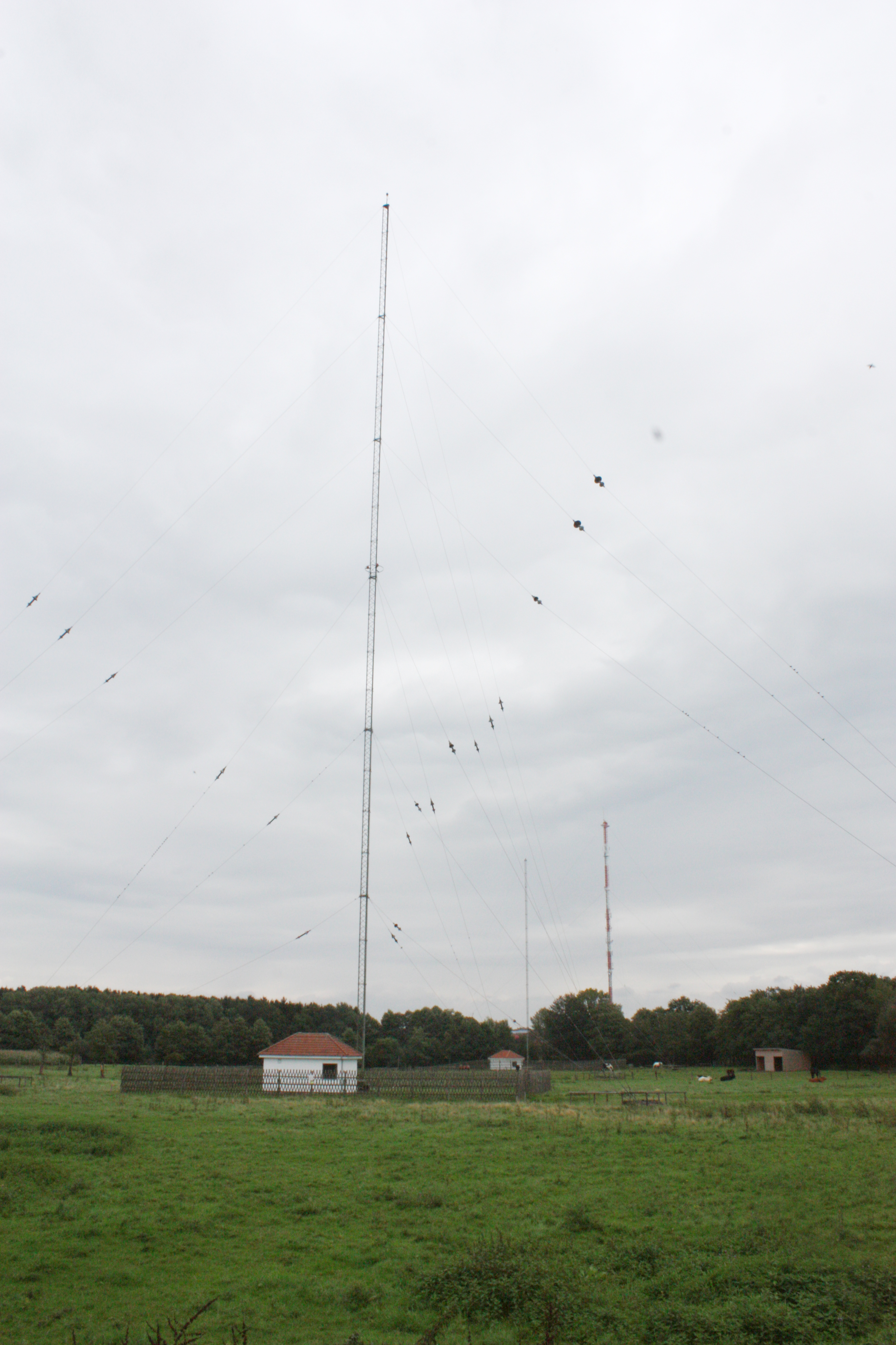 Zeven, ehemaliger Decca Sender; jetzt DGPS sender; 4 Masten von Ost nach West willkürlich mit A, B, C und D bezeichnet;Koordinaten auf WP Diskussion:DECCA-Sender Zeven; links im Vordergrund Mast C, in der Mitte - scheinbar der klinste Mast - Mast B, rechts - mit rotem Anstrich - Mast A